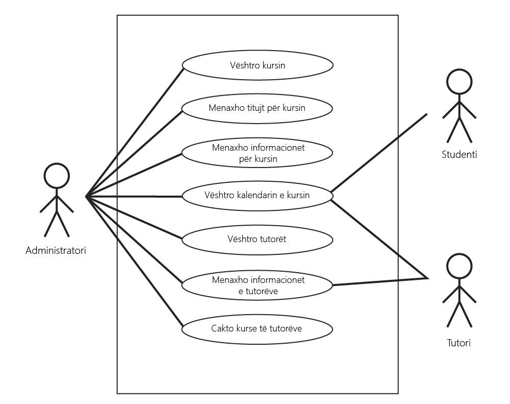 Diagrami i rasteve